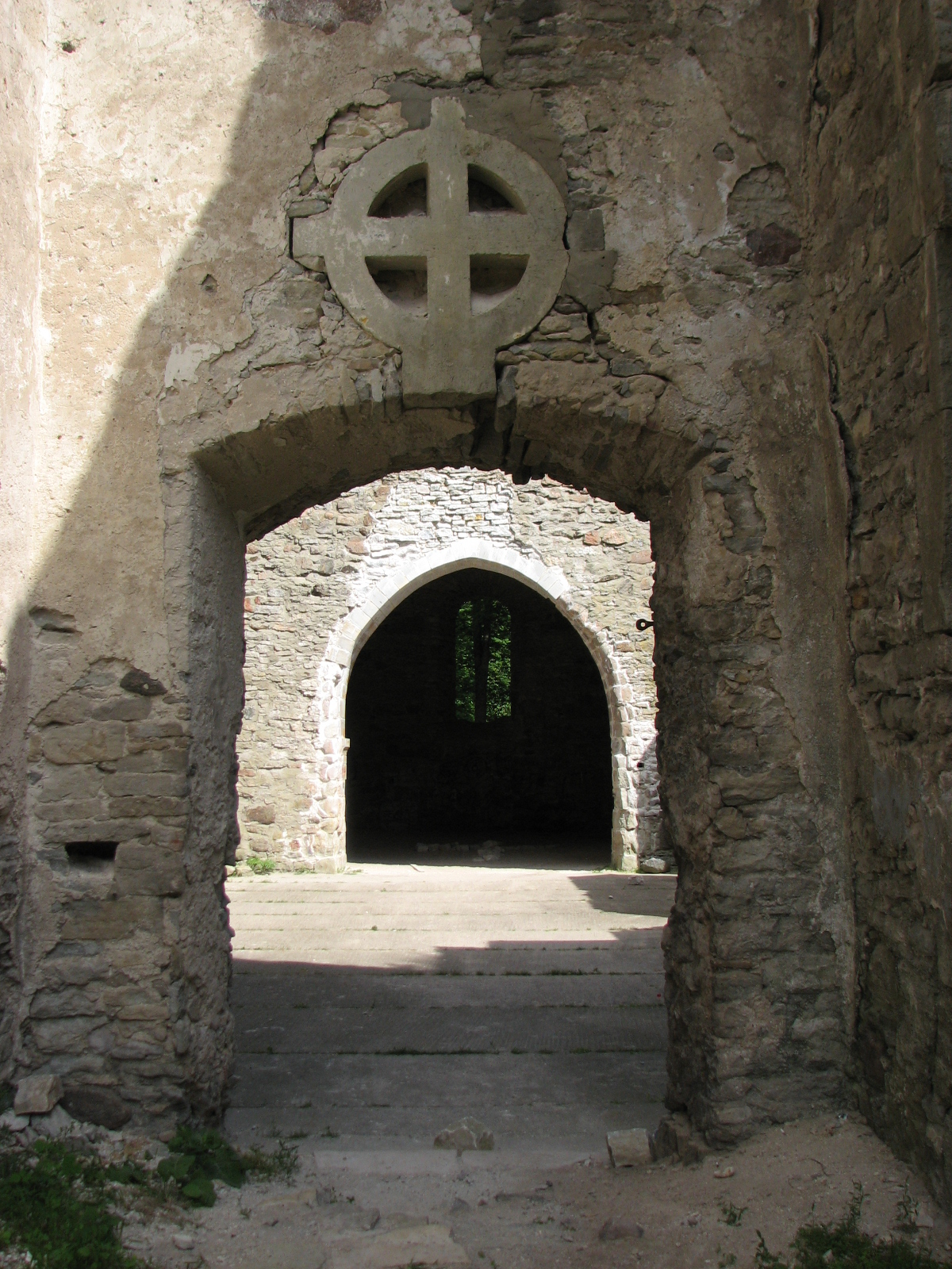 Käina Martin's Church ruins, Käina, Hiiumaa, Estonia